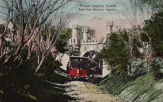 Tranvía cruza bajo el puente del Parque Urquiza, en Paraná (Argentina)